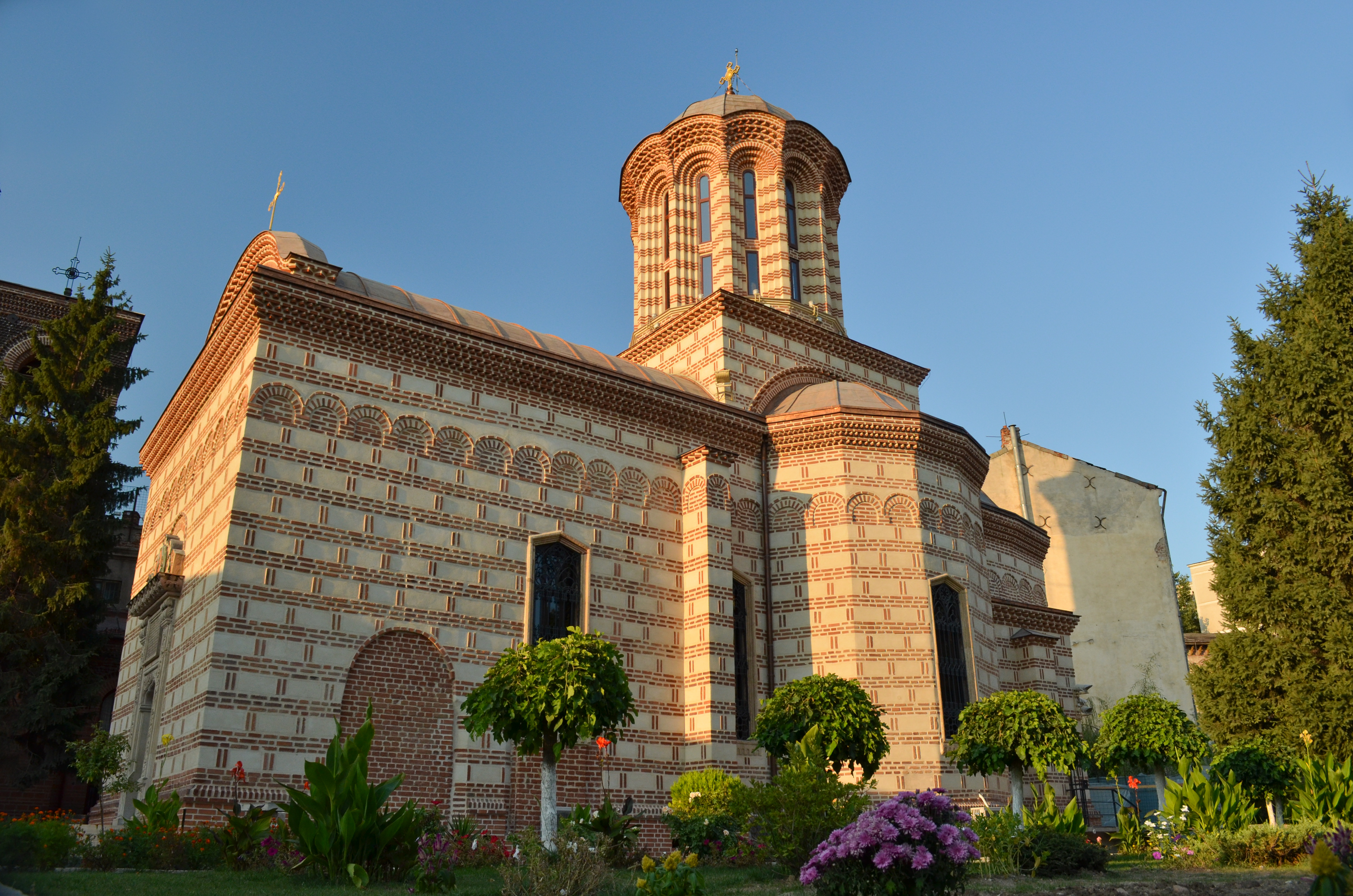 Biserica Curtea Veche după finalizarea lucrărilor de restaurare